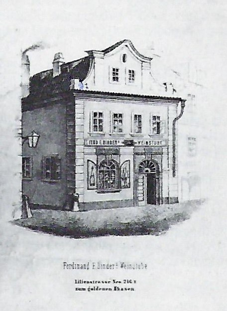 Lithographie der Weinstube von F. E. Binder am Altstädischen Ring in Prag